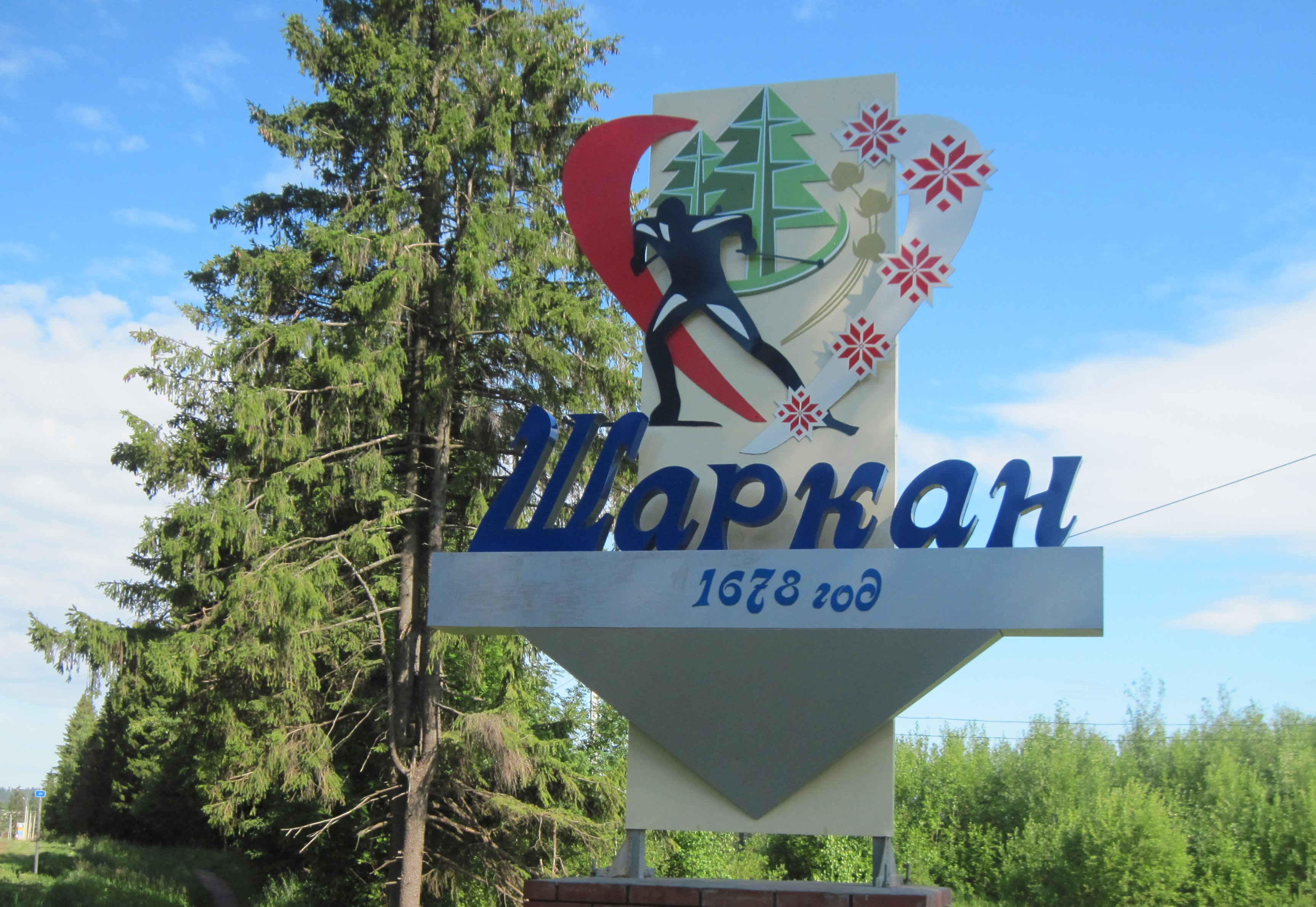 Придорожный указатель на дороге Воткинск-Шаркан